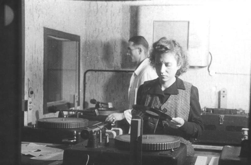 Der Schulfunk des Berliner Senders. Während der Sendung einer Hörfolge. Im Mischraum hier werden die für den Hörspiel erforderlichen, auf Platten und Tonbändern aufgenommenen Geräuschkulissen eingeblendet. Fot. Schwahn-Illus. 2.11.46 333-46